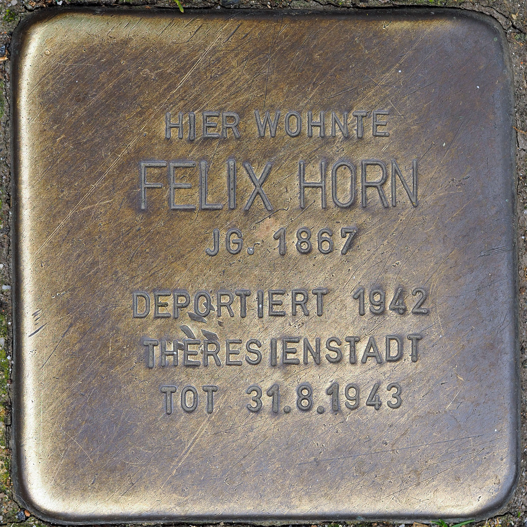 Stolpersteine MG: Horn, Felix